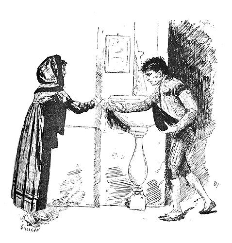 Ilustración de "El 19 de marzo y el 2 de mayo". Administración de La Guirnalda y Episodios Nacionales, 1882. Ilustraciones de los hermanos Mélida.